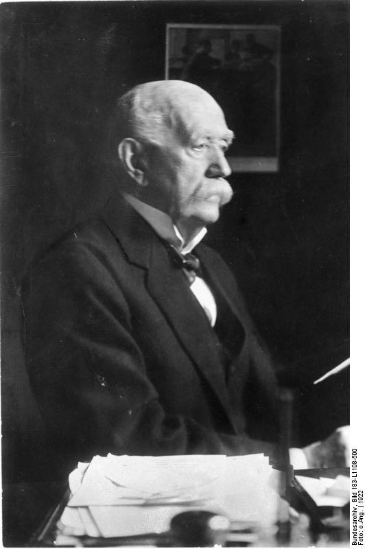 ADN-ZB/Archiv Geheimer Kommerzienrat Eugen Gutmann, Ehrenpräsident des Aufsichtsrates der Dresdner Bank,blickt am 1.Dezember [1922] auf seine 50-jährige Tätigkeit in der Bank zurück.